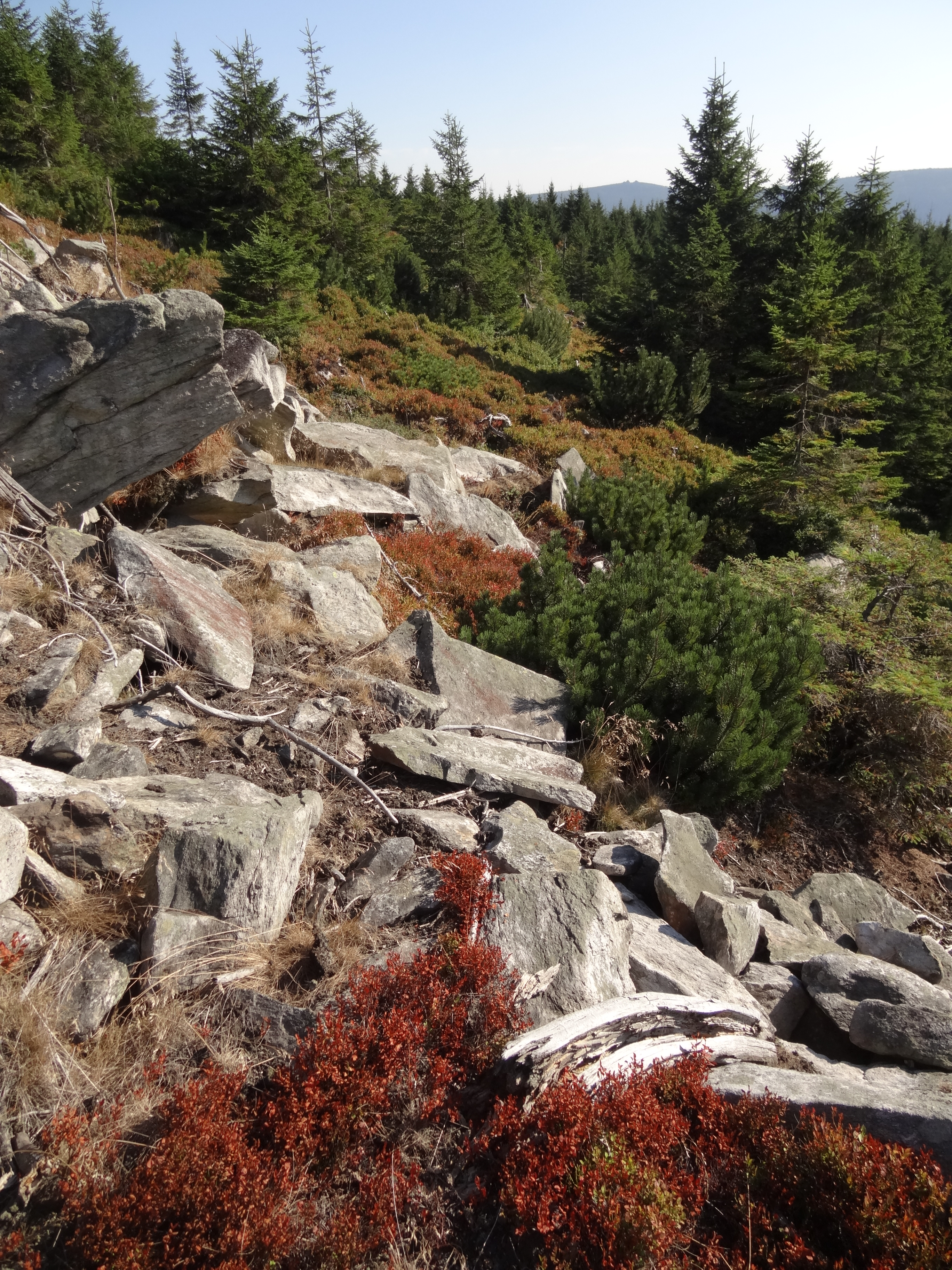 PP Klečoviště na Smrku - jediná lokalita kleče na minerálním podkladu v Jizerských horách